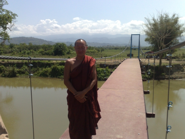 Ponte sul Wetngin, Kachin State, Myanmar. Distrutto e salvato da un monaco.